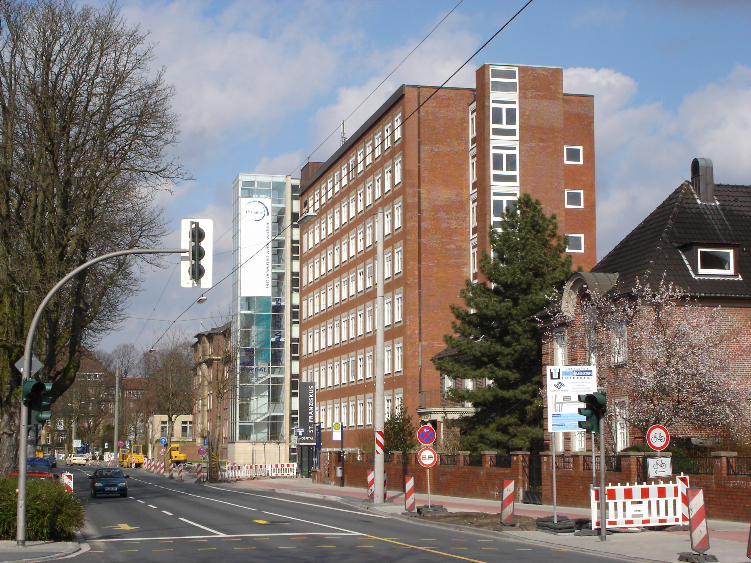 St.-Franziskus-Hospital in Münster, Westfalen, Deutschland